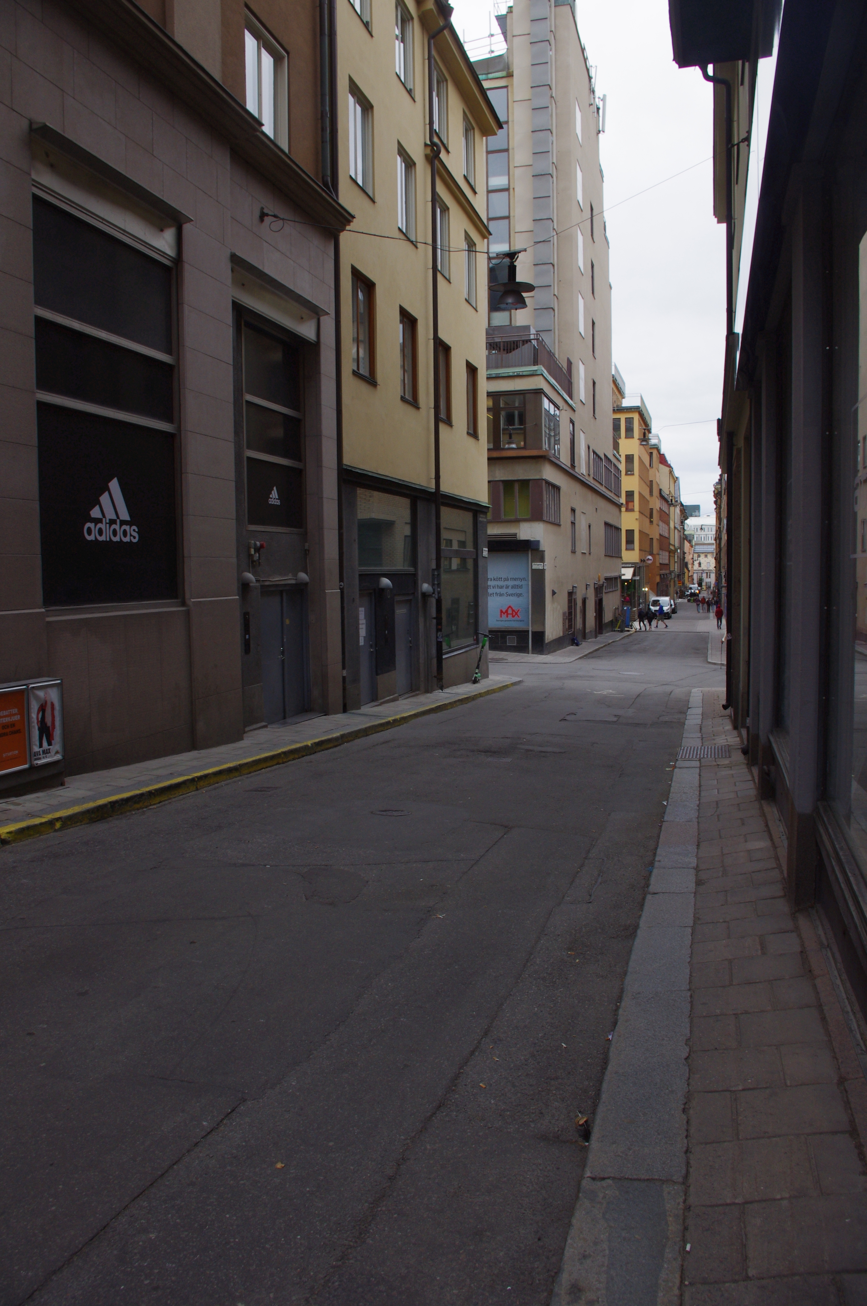 Apelbergsgatan, Stockholm där A$AP Rocky överföll en tonåring.